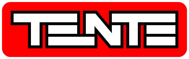 Logotipo de Tente, juego de construcción de EXIN.